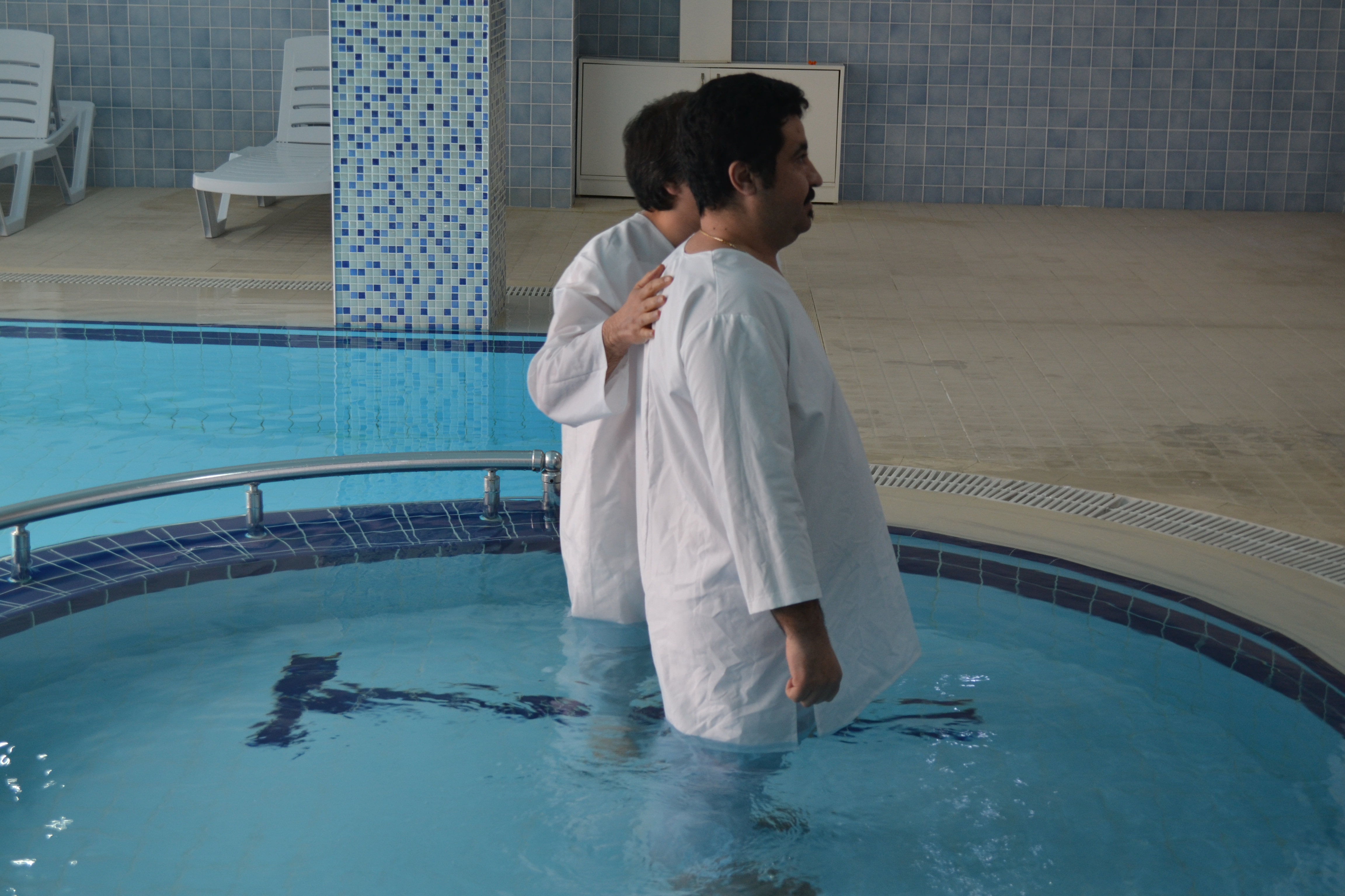 مراسم تعمید آرمان محمدی